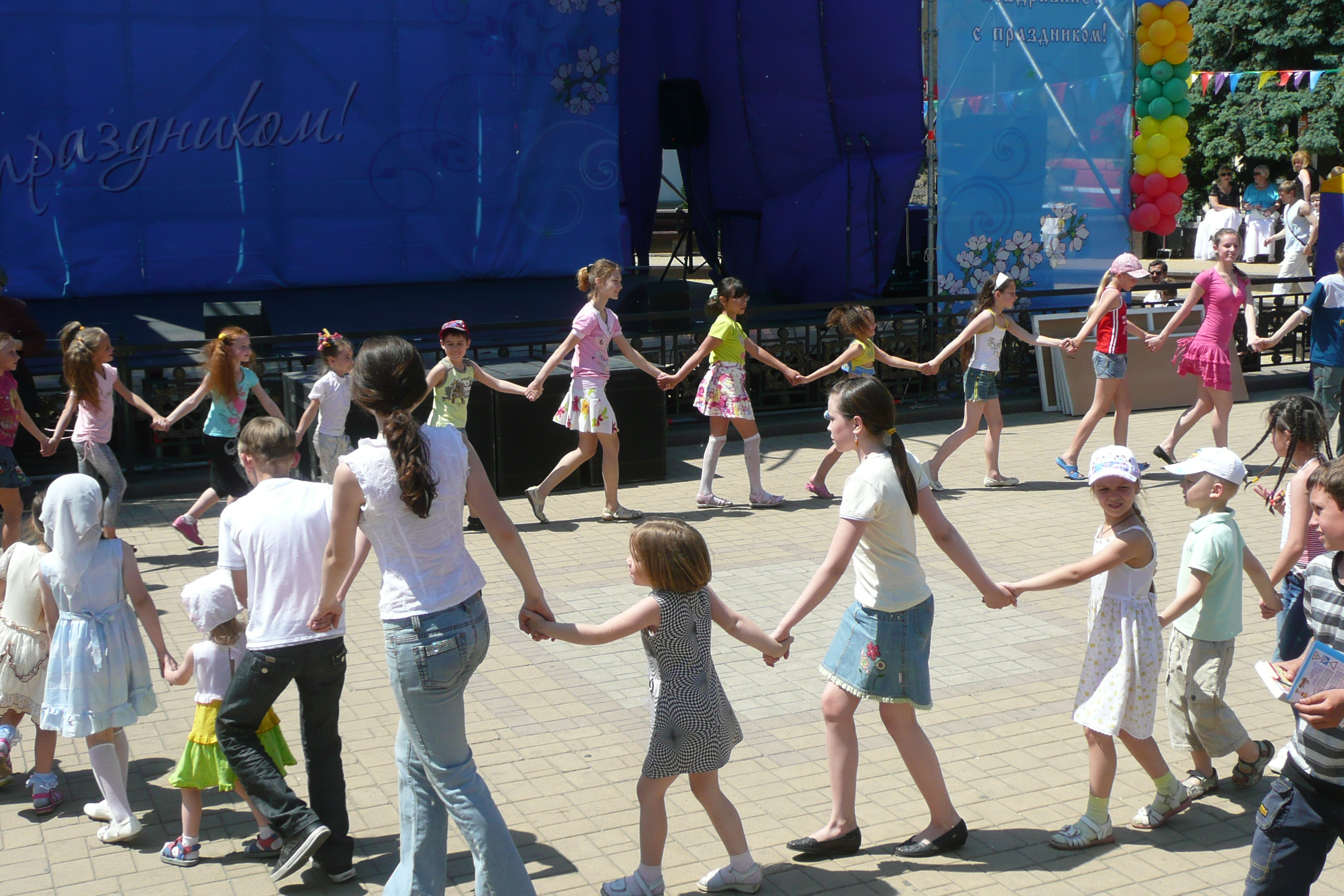 День защиты детей в Донецке